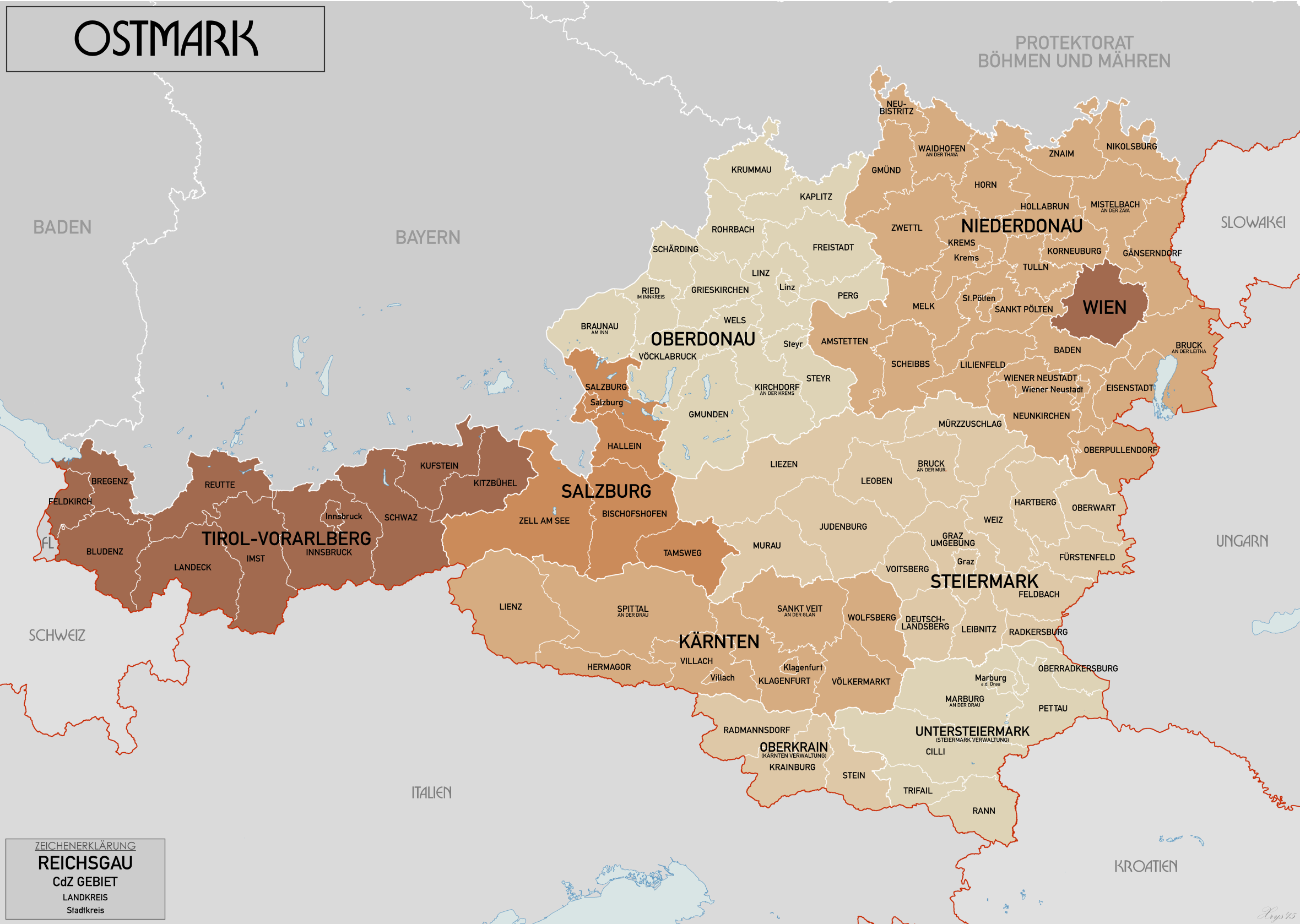 Verwaltungskarte Ostmark in 1941. Es zeigt Reichsgaue und CdZ Gebiete auch Landkreise und Stadtkreise. Grundmaterial: Karte von Mitteleuropa 300k, Karte des Deutschen Reiches 100k. Grundkartenquelle